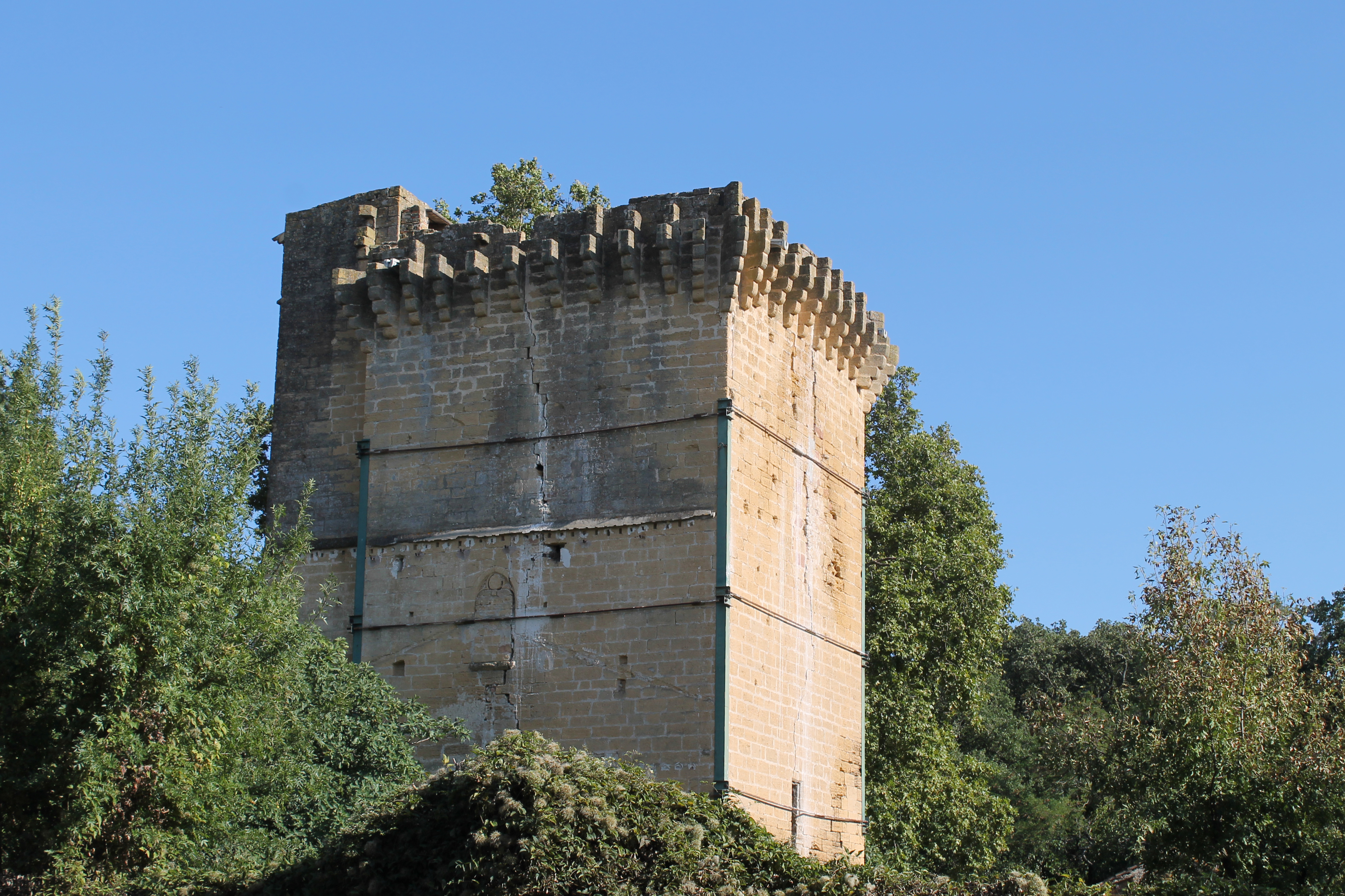 Tour et chapelle d'Entressen